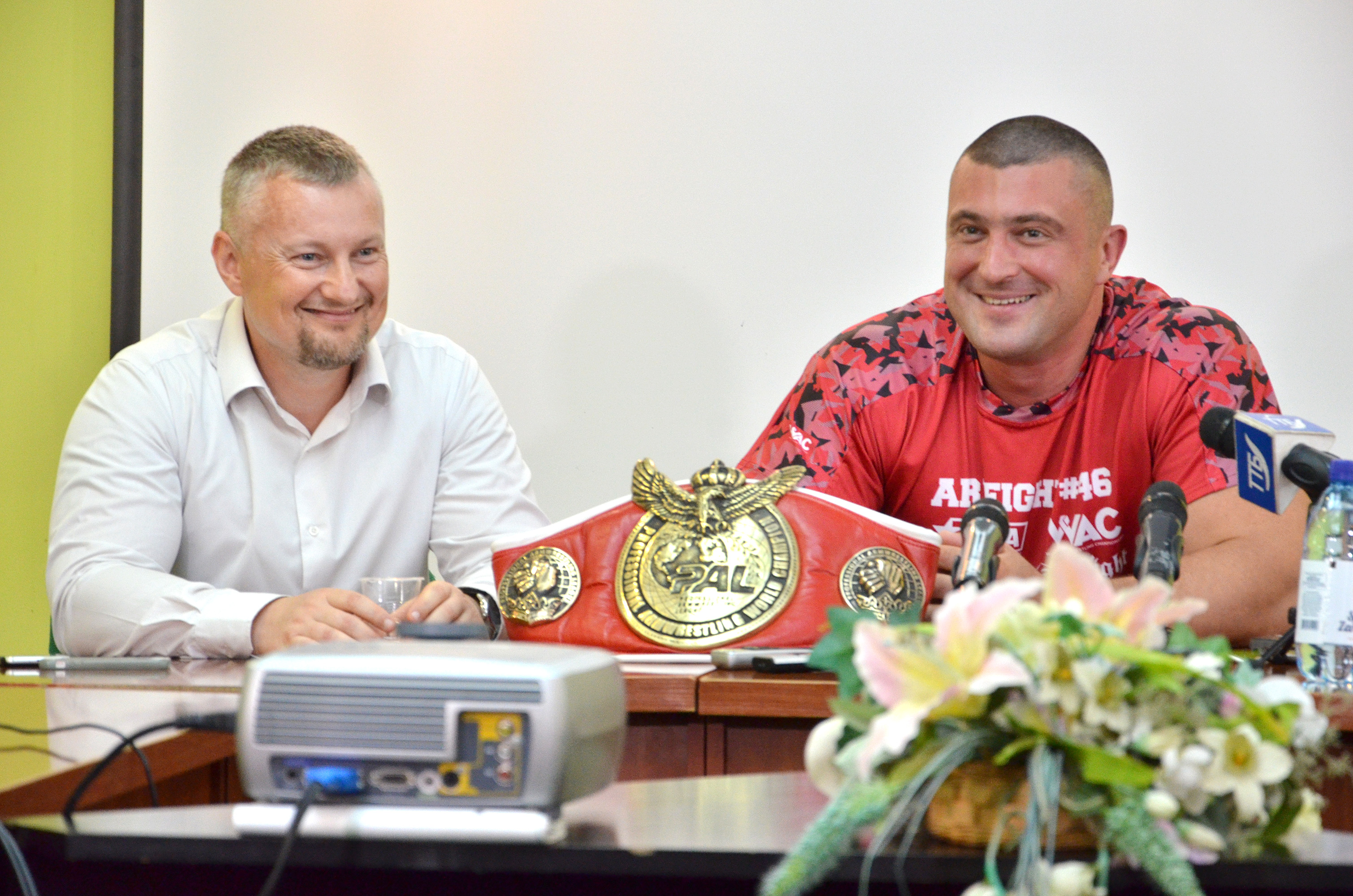 Українські спортовці, чемпіони світу, багаторазові чемпіони та призери чемпіонатів України Віктор Мацикур і Андрій Пушкар під час пресконференції.